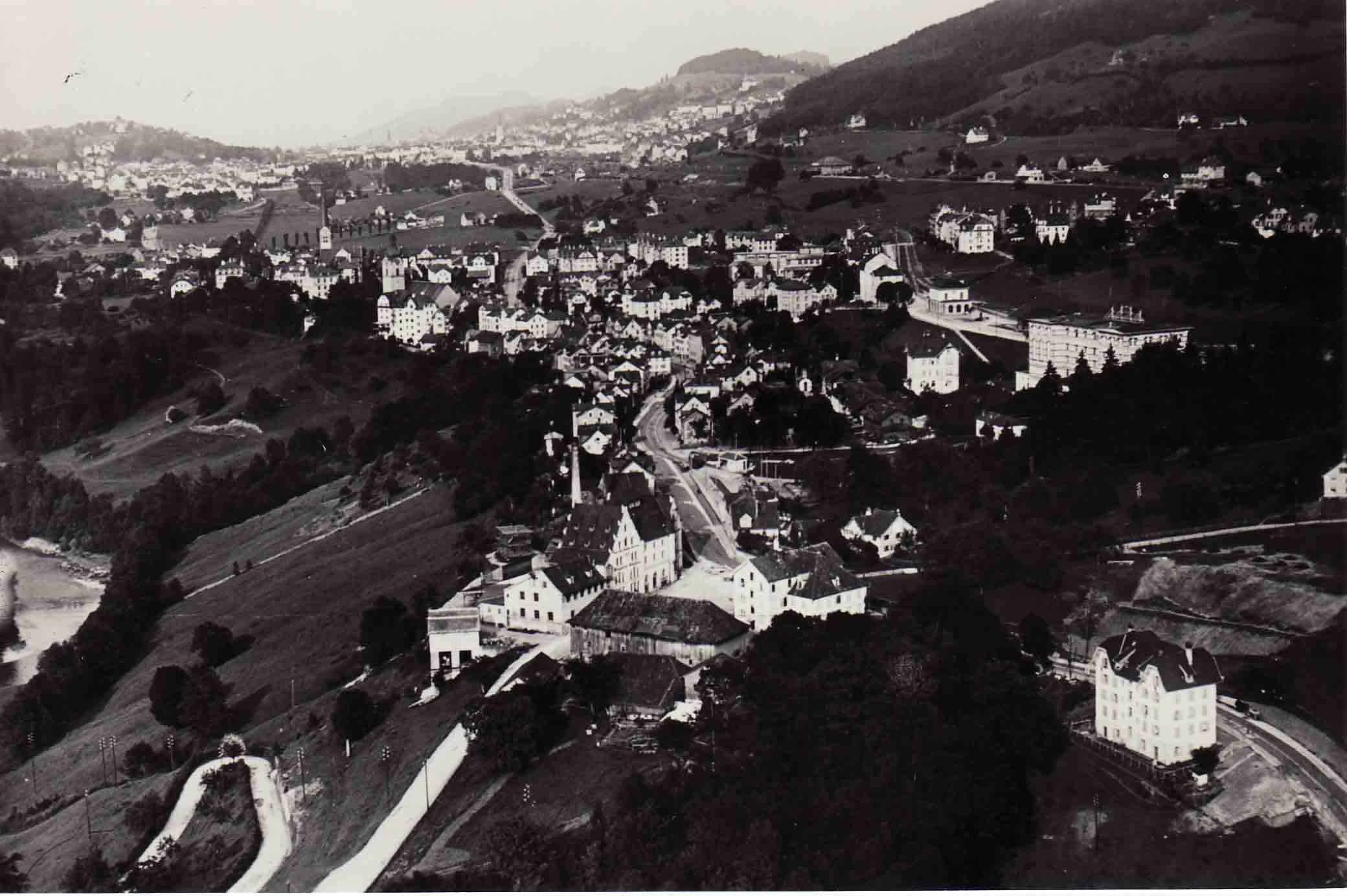 Bruggen, Brauerei Stocken, Kräzernstrasse 10 Blick gegen Osten; vor dem Bau der Fürstenlandbrücke (1937 bis 1941)